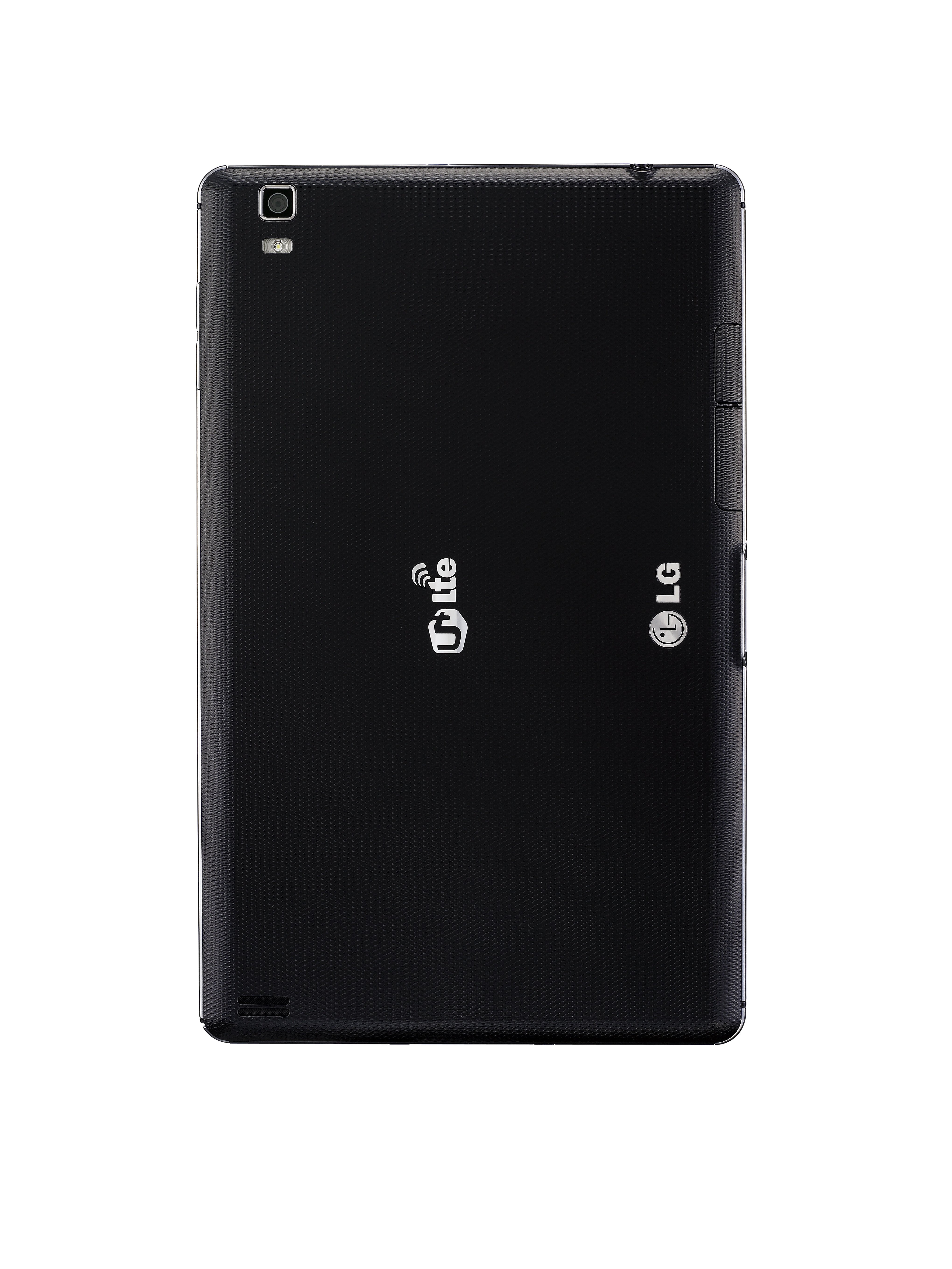 LG 유플러스를 통해 출시되는 태블릿 ‘LG 옵티머스 패드 LTE(모델명: LG-LU8300)’ ※ LG전자 뉴스룸 에서 관련 보도자료를 확인실 수 있습니다.